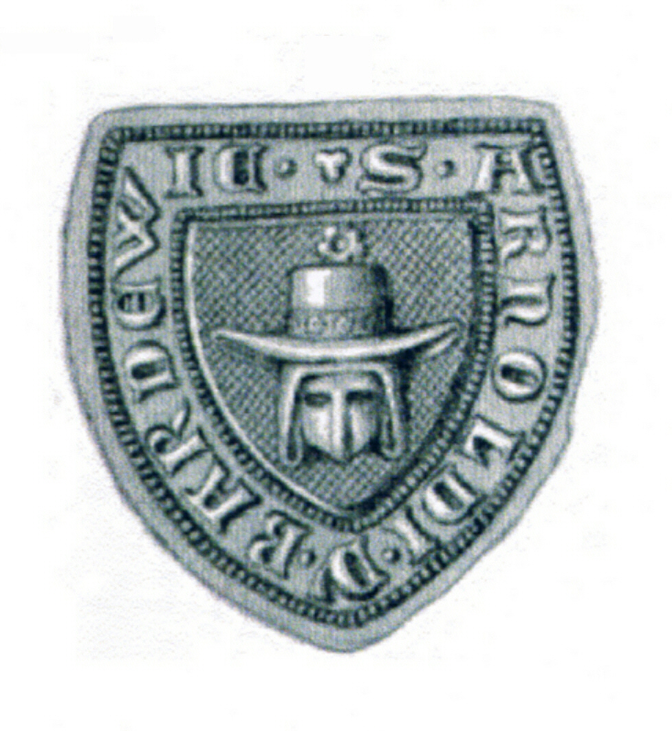 Siegel des Arnoldus de Bardewic. Das Siegel stammt aus der Zeit um 1328. Siehe Emil Ferdinand Fehling: Lübeckische Ratslinie, Nr. 332 (Arnold von Bardewik).